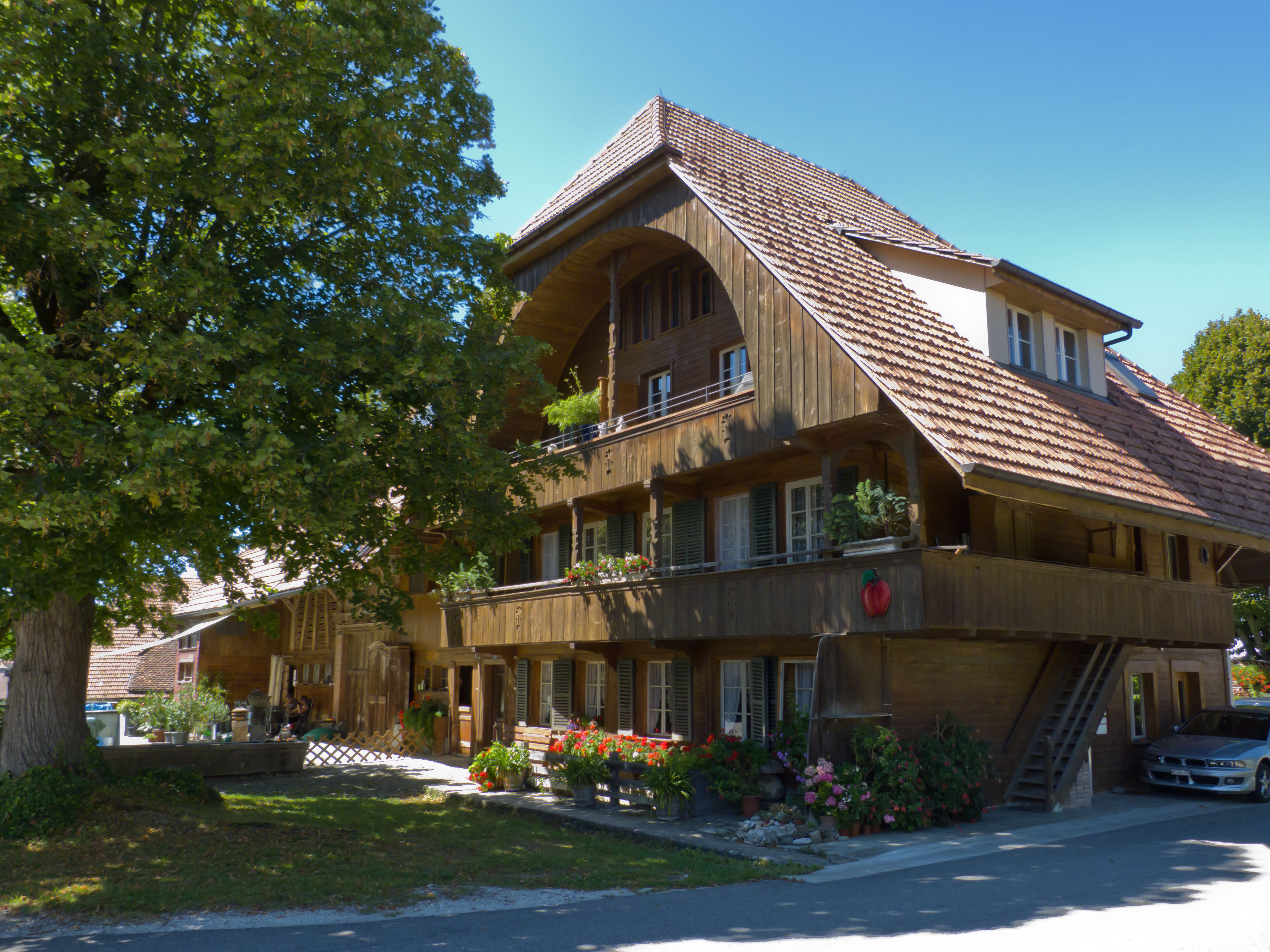 Ehemaliges Bauernhaus total umgebaut zu Wohnzwecken Nachbargebäude Speicher 209A